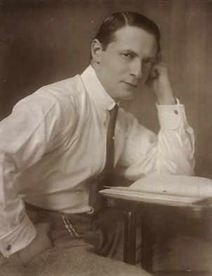 Der österreichische Schauspieler Hermann Wlach